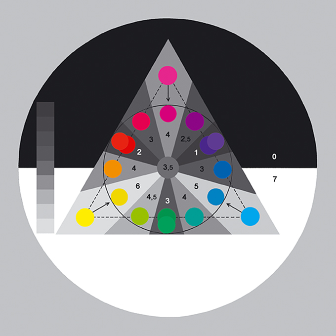 Zwölfton_Schema des AMC zur Analogie von Helligkeits- u. Farbtondifferenzierung, Bendin 1991/2010